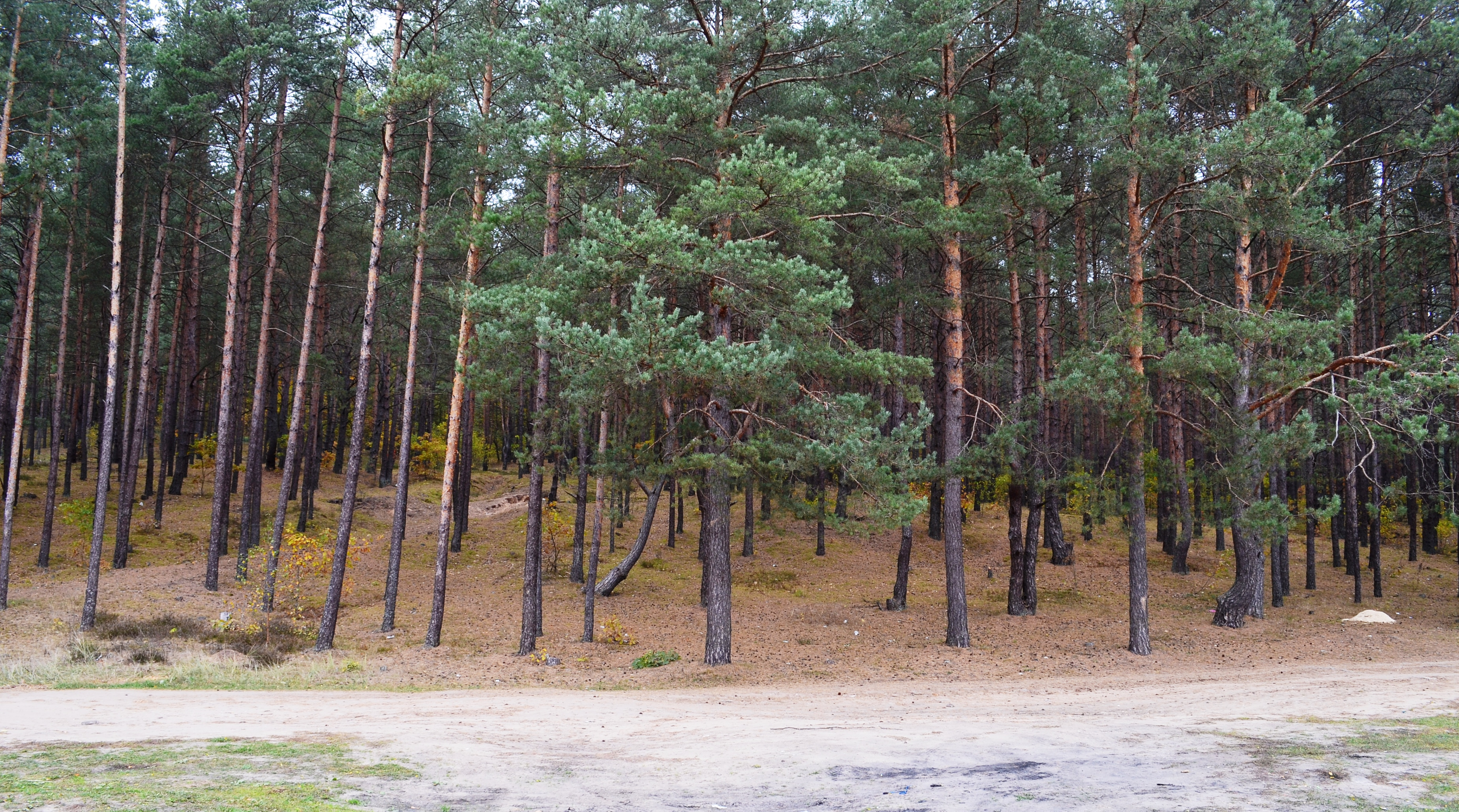 Aukštagirio geomorfologinis draustinis, Vilnius